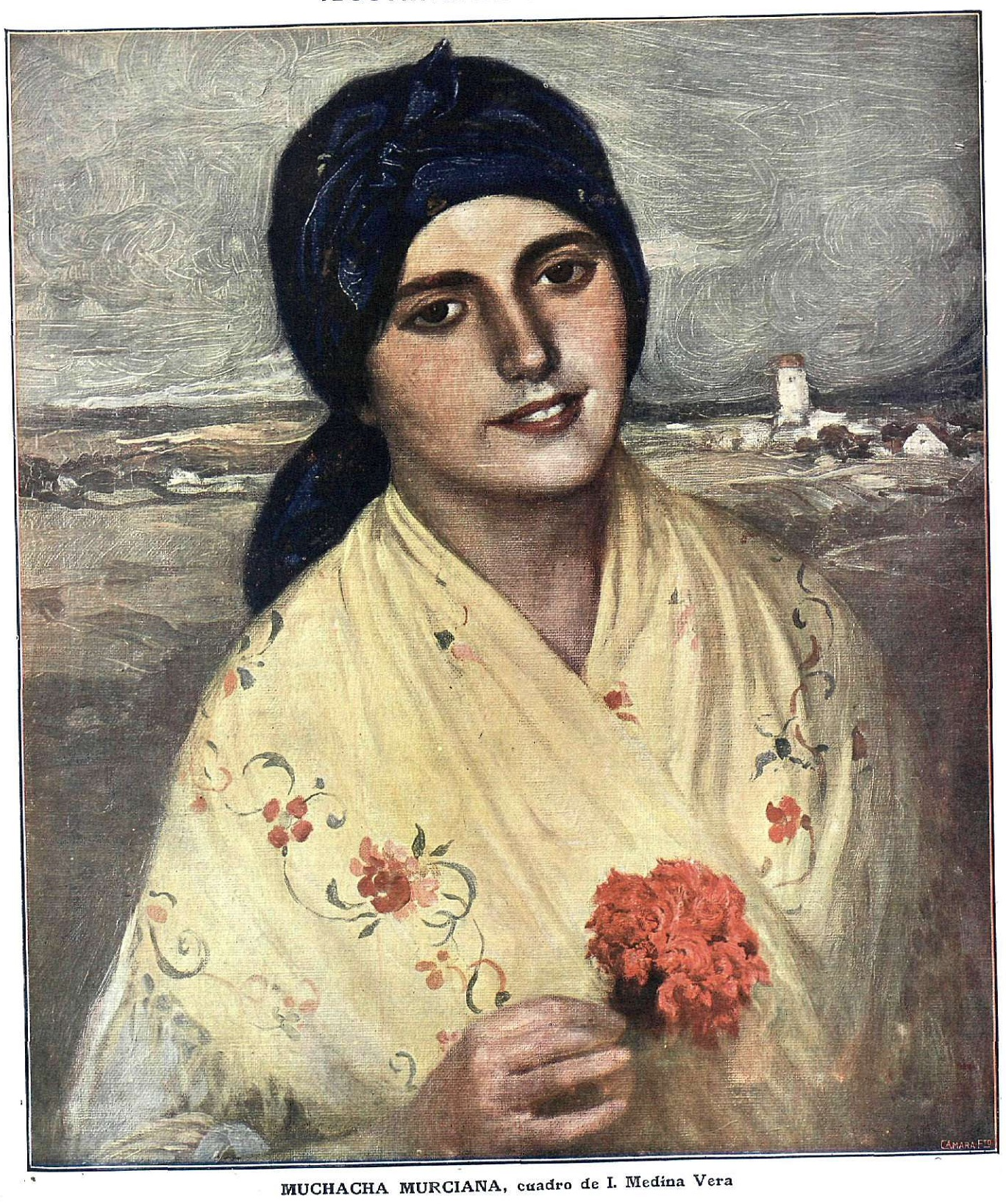 Muchacha murciana, obra del pintor Inocencio Medina Vera, recogido en la revista española La Esfera.